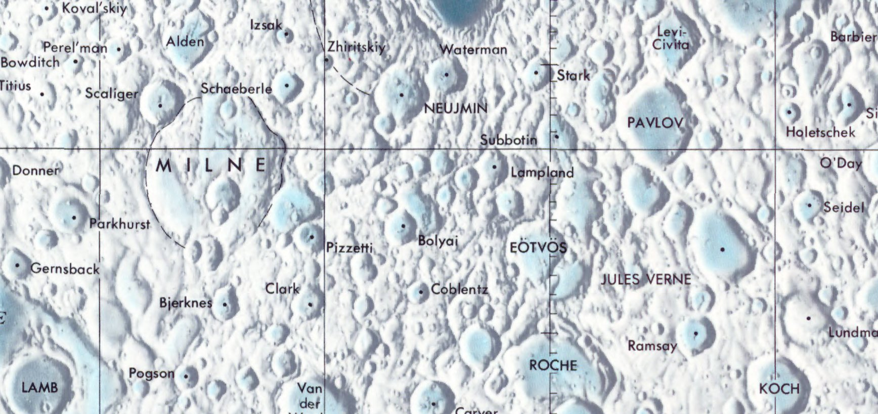 Cráter lunar Bolyai. Localización. (Lunar Chart LPC1. Second Edition)